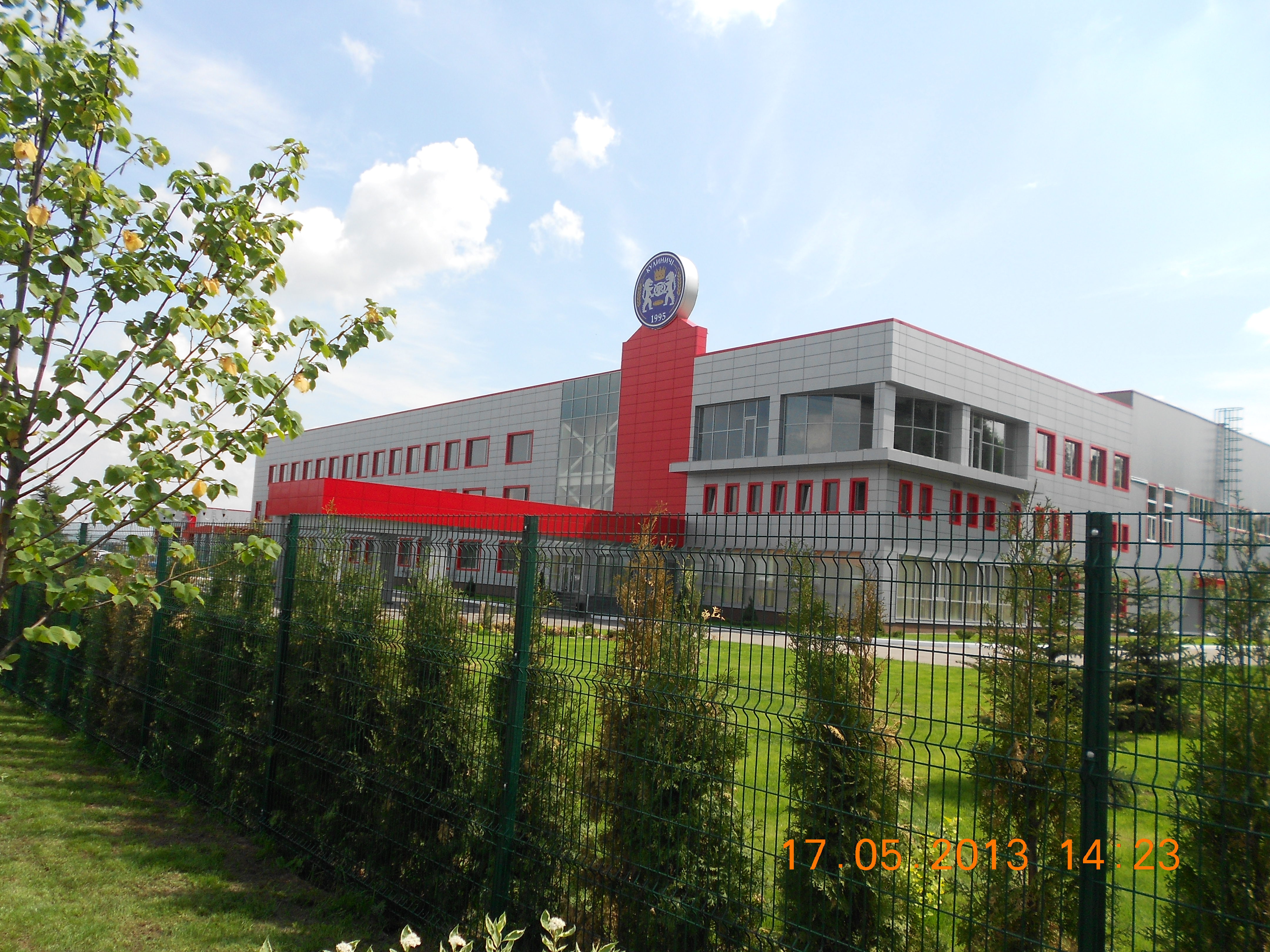 Krushynka17-05-2013Zavod